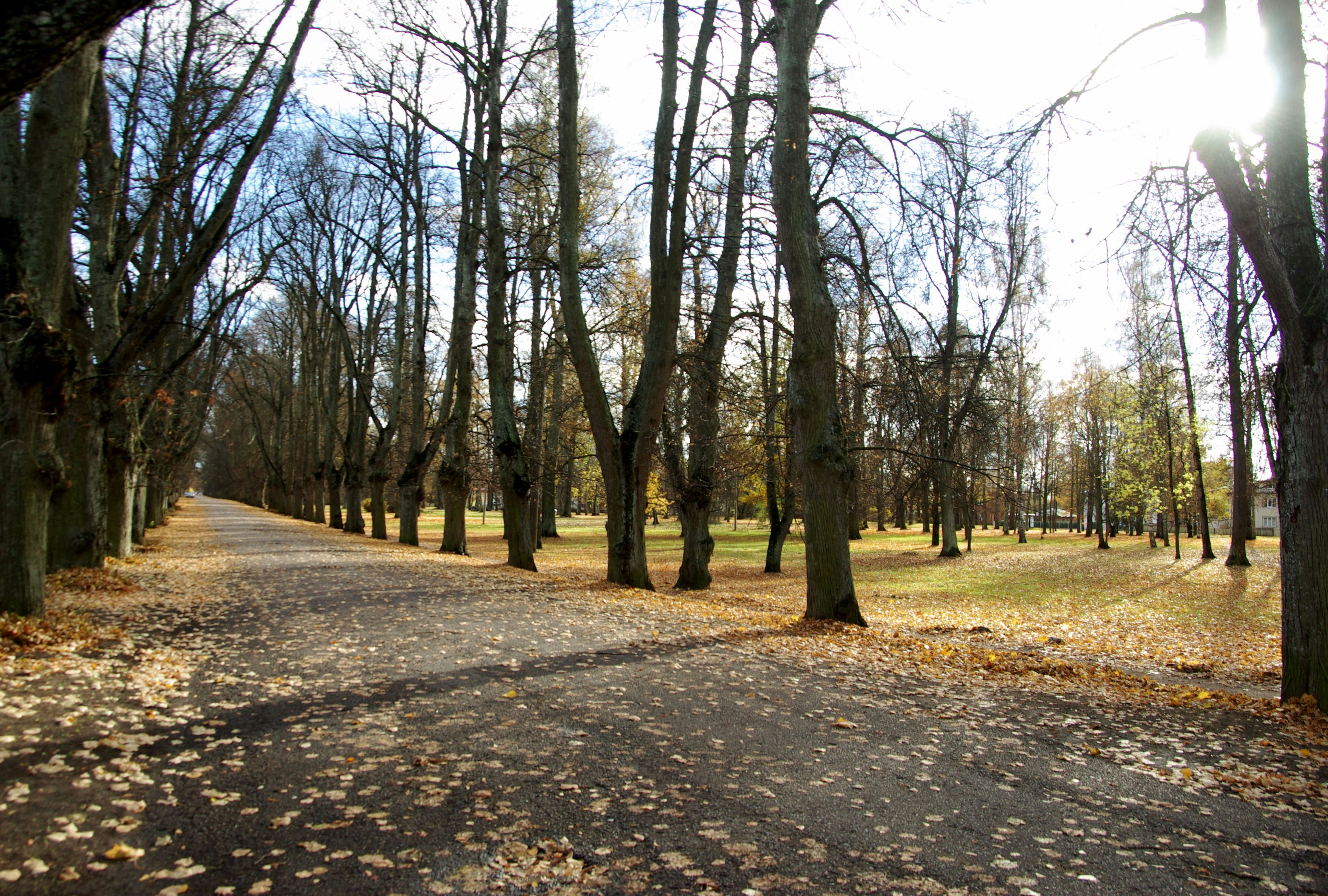 park Tartus